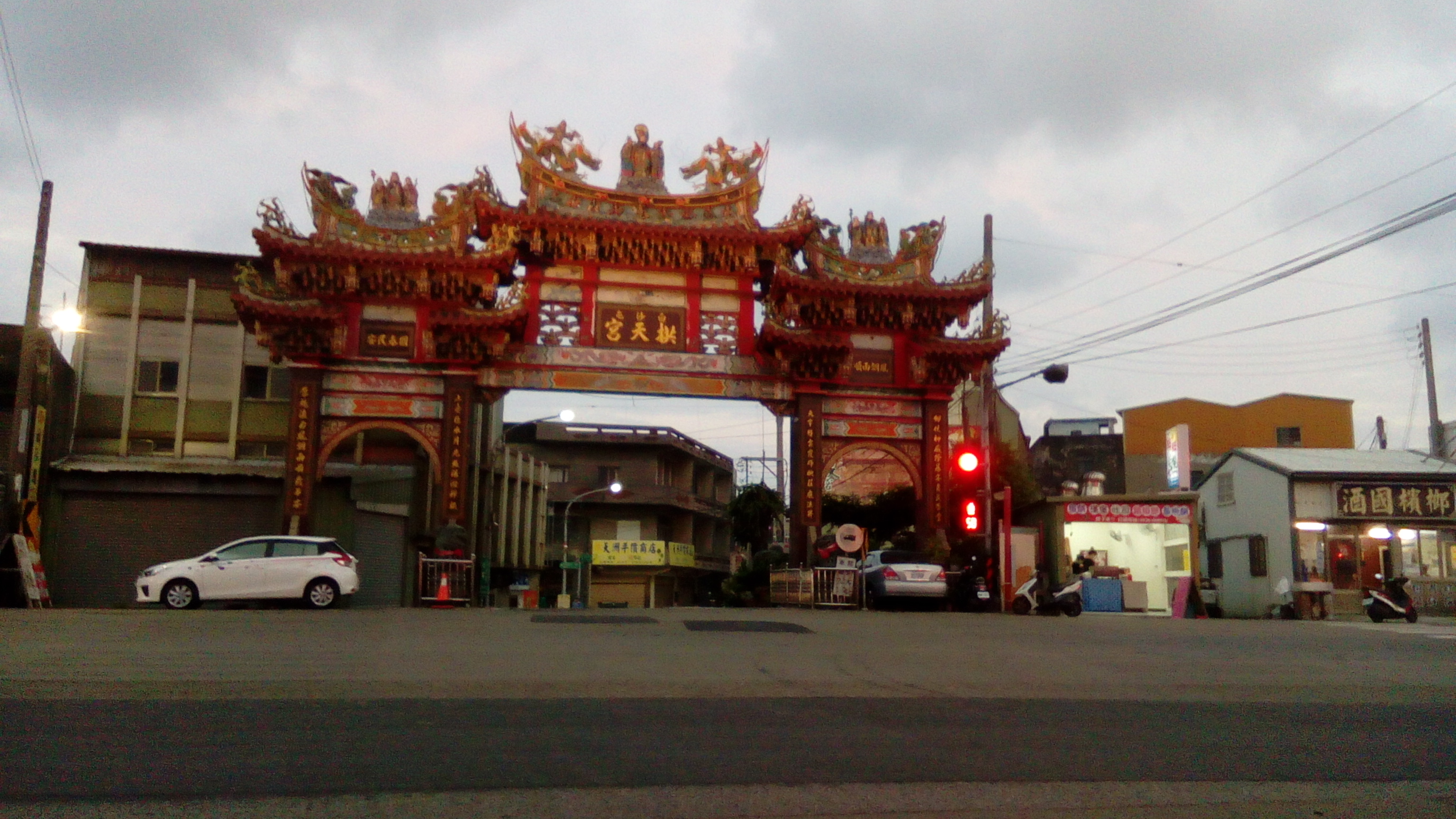 位於通霄鎮白東里